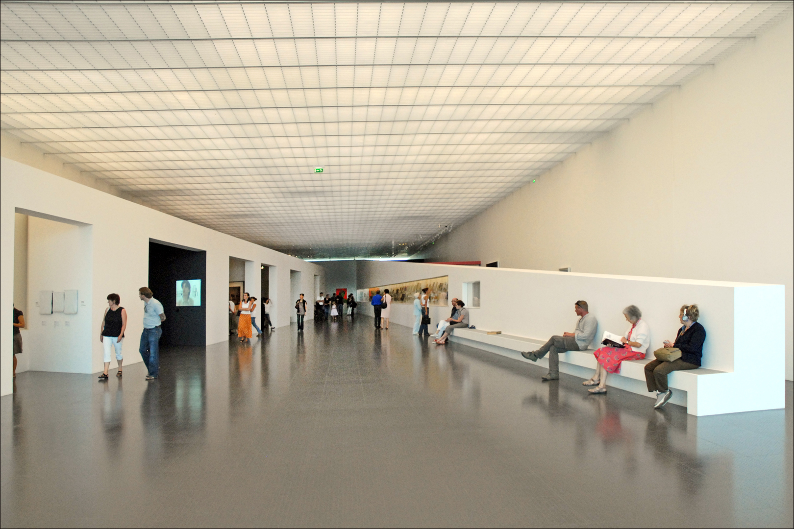 La galerie supérieure de l'exposition Chefs-d'oeuvre au Centre Pompidou Metz